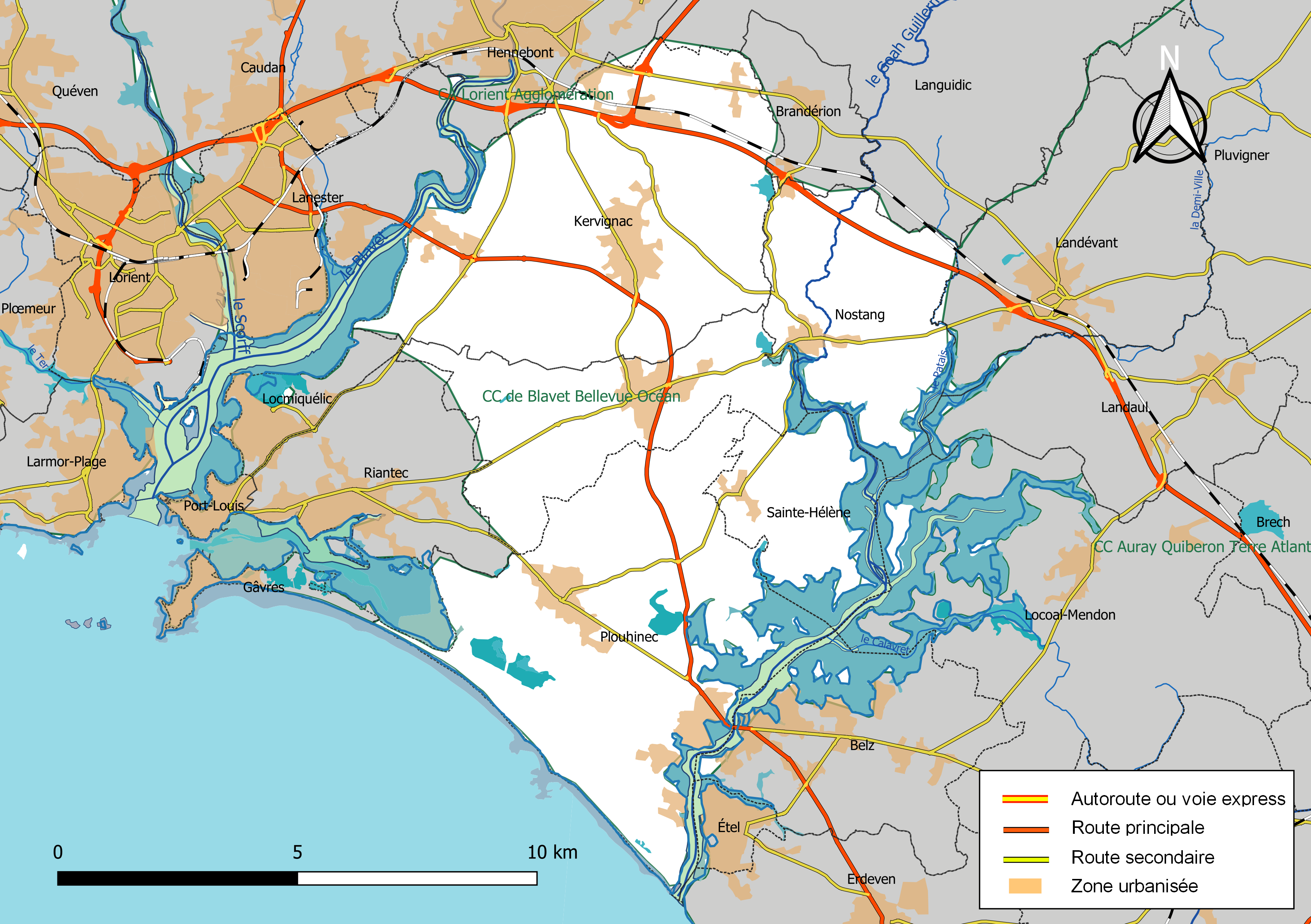 Carte géographique de la Communauté de communes de Blavet Bellevue Océan, département du Morbihan, France. Composition au 1er janvier 2019.